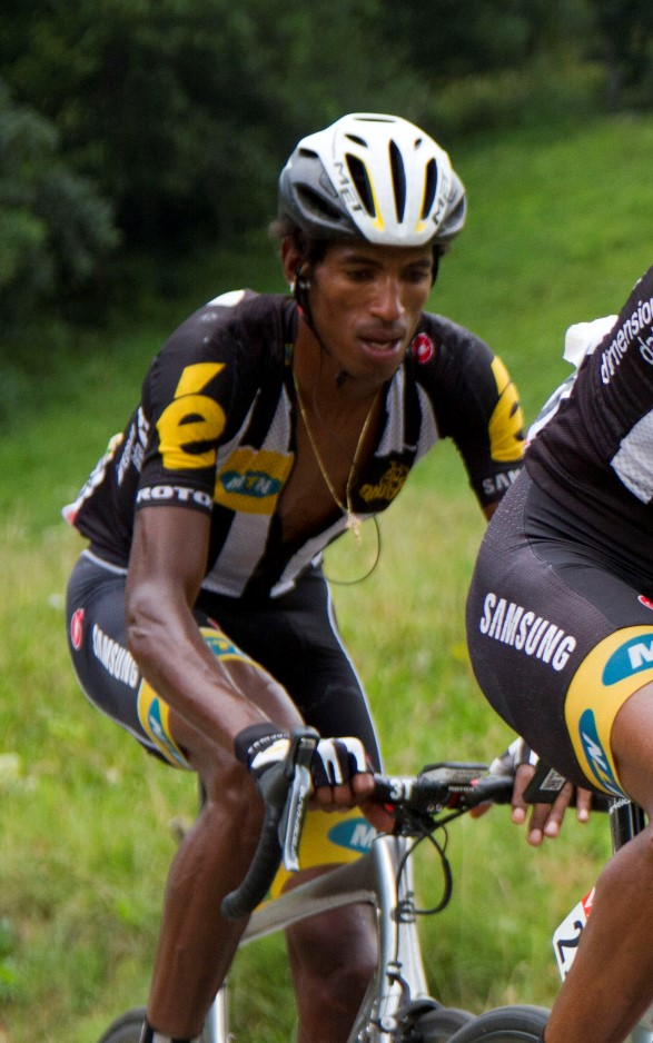 194 teklehaimanot en kudus